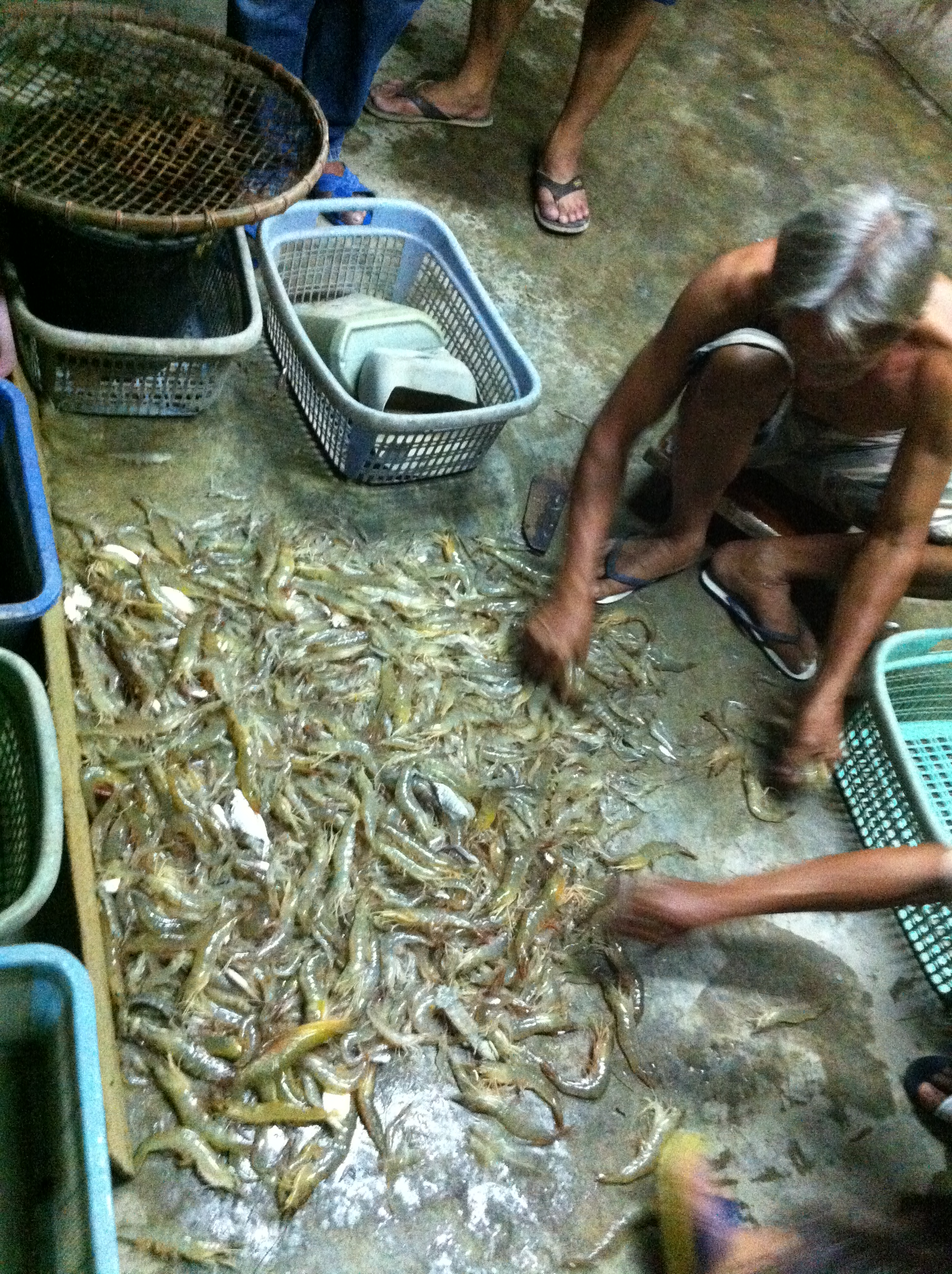 การแยกขนาดกุ้งขาว